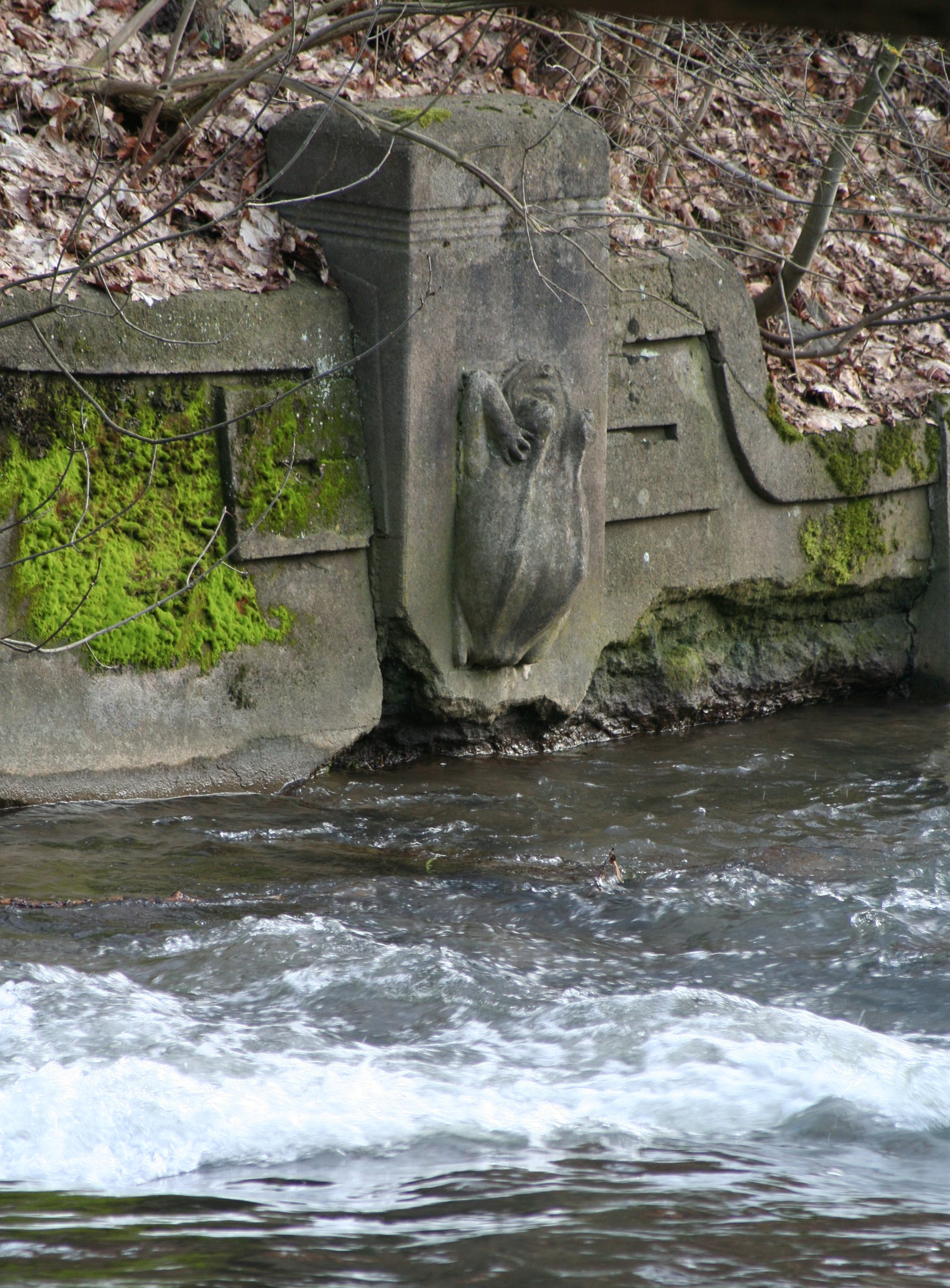 Uferstraße an der Ketschenenbrücke in Coburg